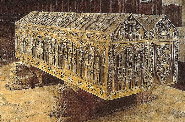 Sepulcro del rey Alfonso VIII de Castilla (1155-1214) y de su esposa, la reina Leonor de Plantagenet (1160-1214).